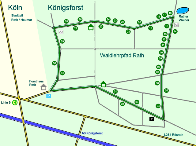 Lageplan des Waldlehrpfades Rath im Königsforst